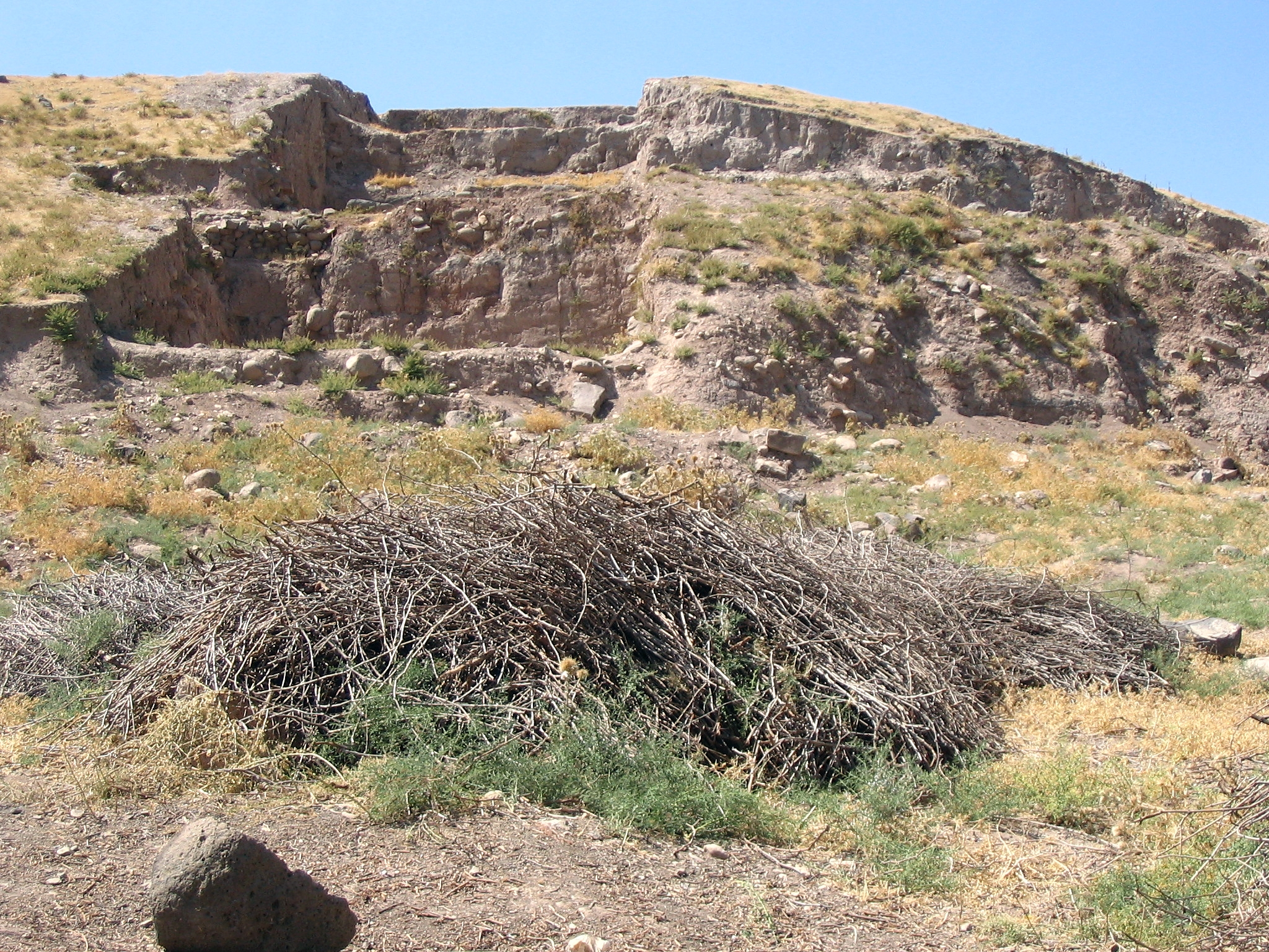 Siedlungshügel Oylum Höyük, Südosttürkei